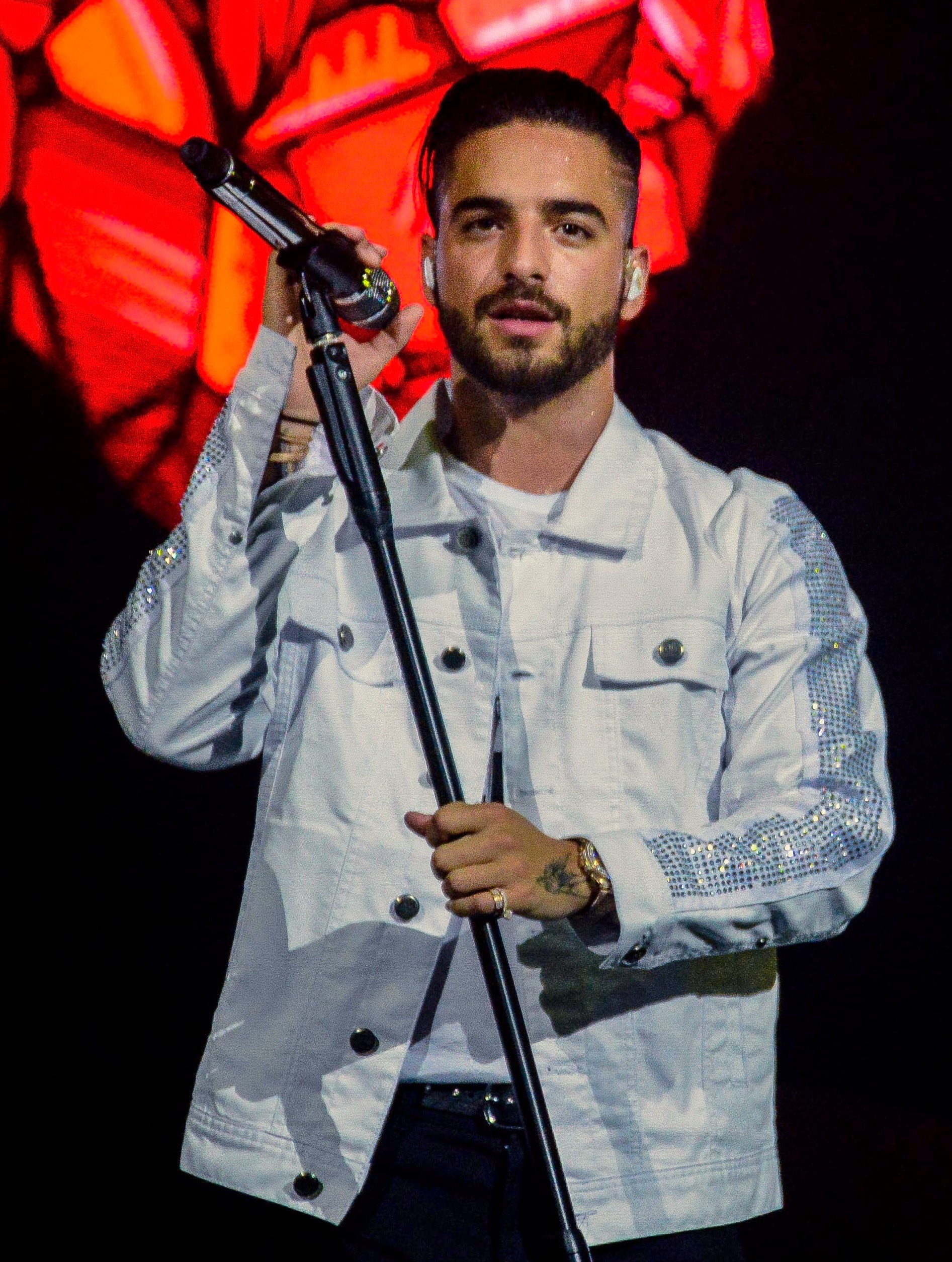 El maluma en un concierto